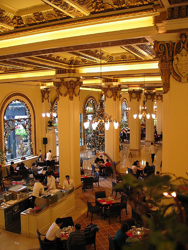 Hong Kong Peninsula Hotel